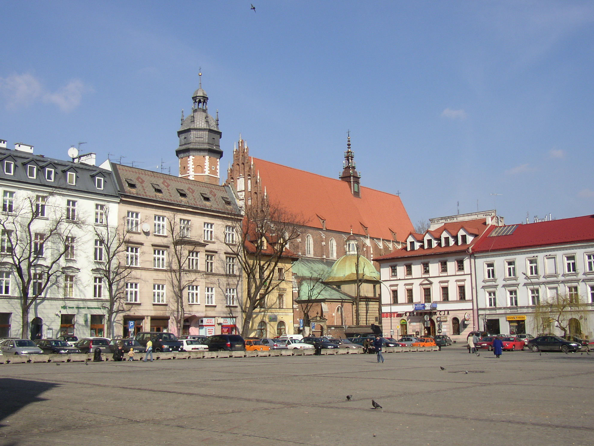 Kraków - Plac Wolnica